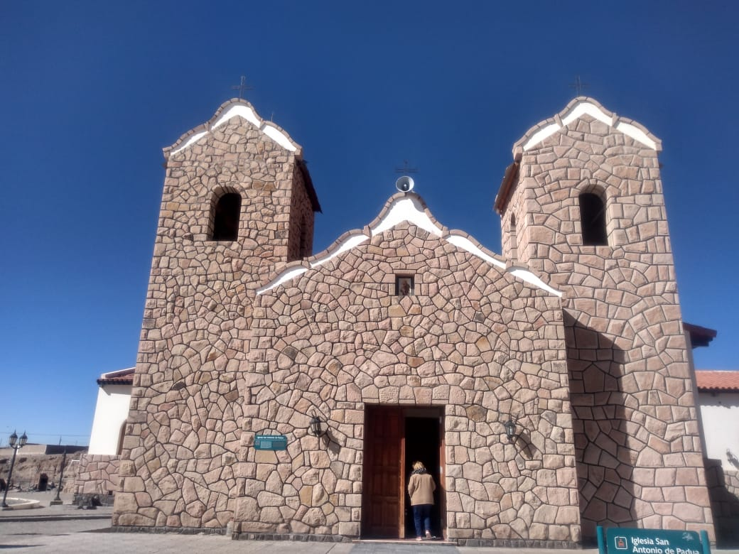 La parroquia San Antonio de Padua pertenece al departamento de los Andes en la Puna Salteña. Fue erigida en la primera década del siglo xx, cuando el lugar tenía un tráfico relativamente importante de personas y cargas. En el año 1984 fue confiada la parroquia a la congregación de las Misioneras de Jesús Verbo y Víctima.fachada de iglesia